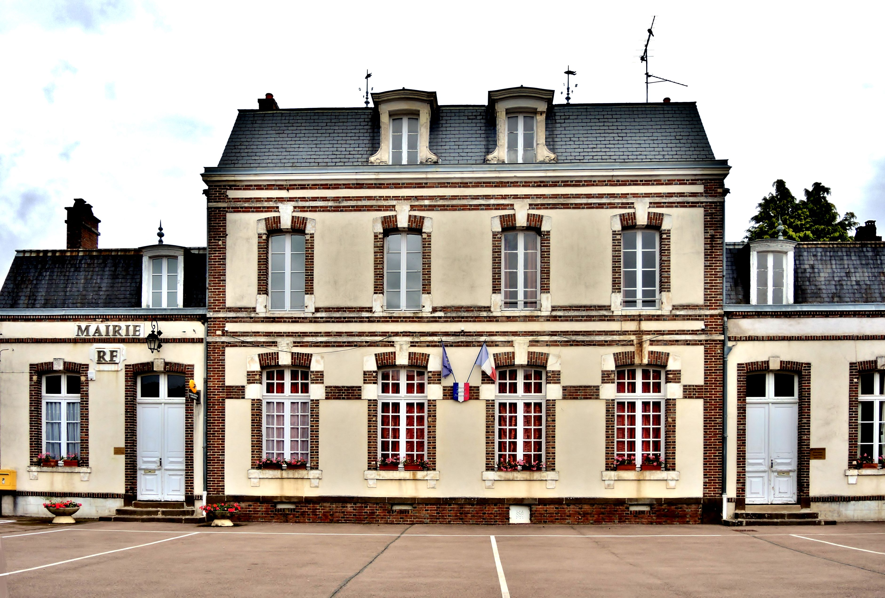 Façade de la mairie de Mézilles. Yonne